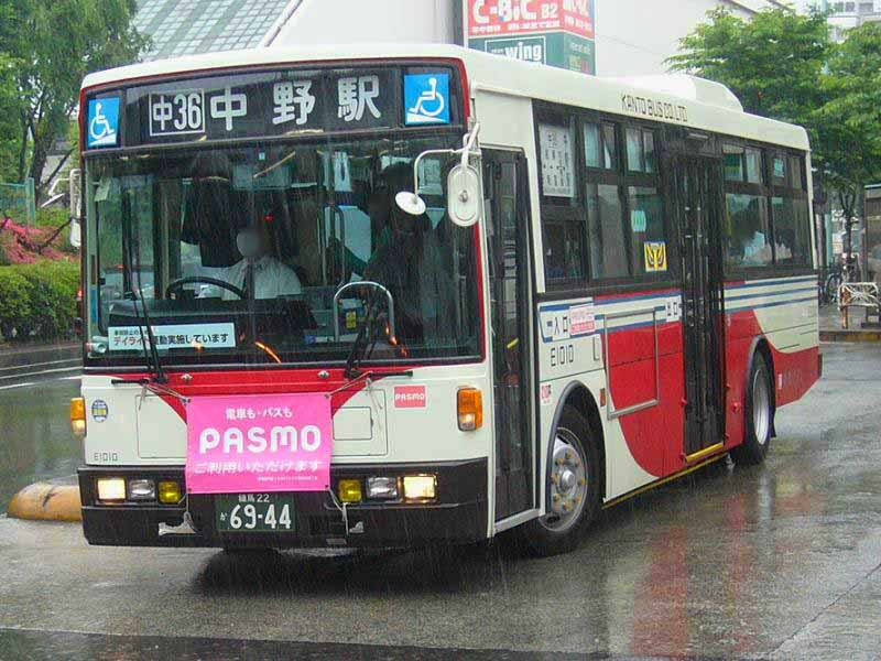 登録番号：練馬22か69-44 関東バス五日市街道営業所所属 車番E1010